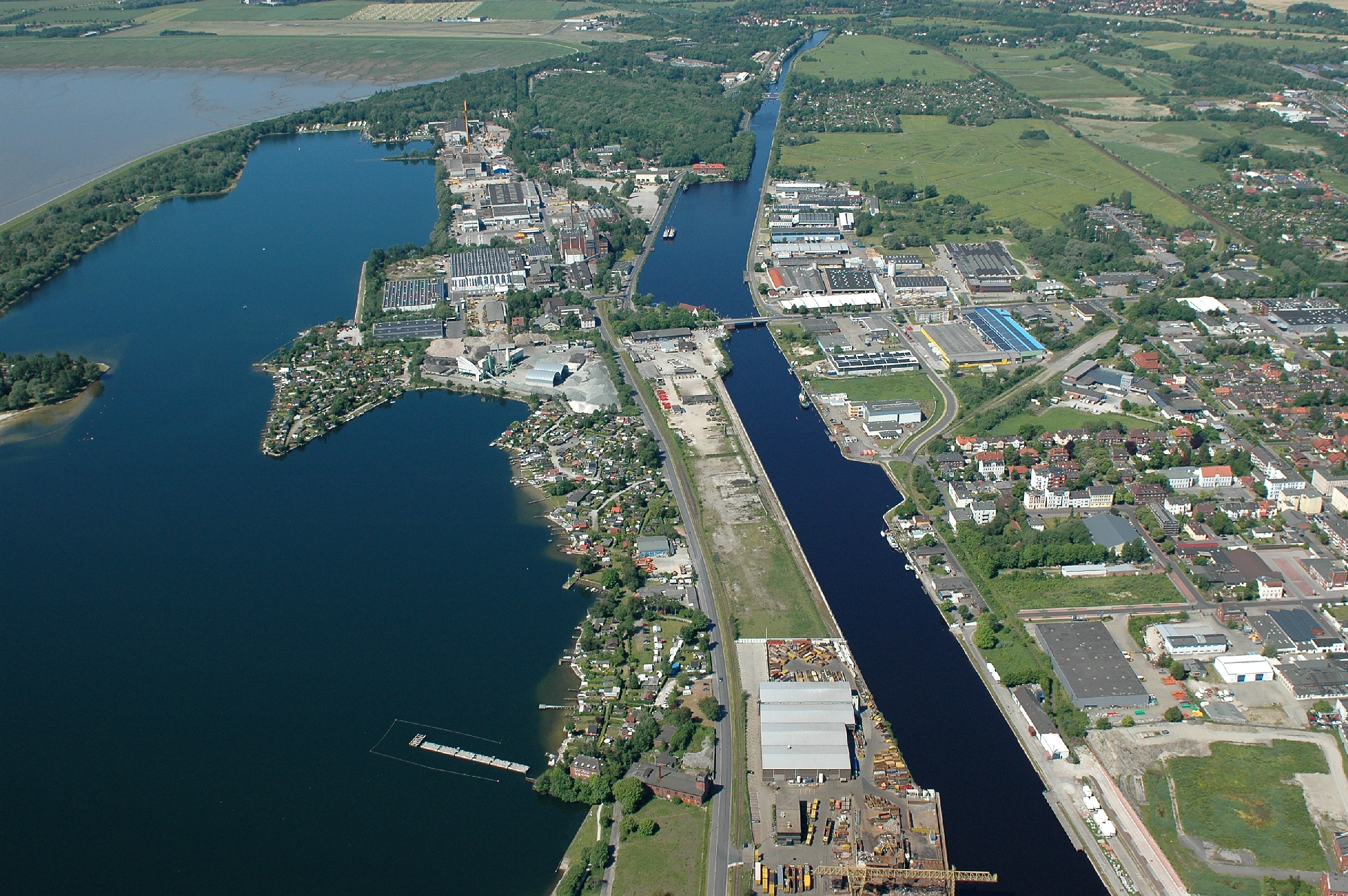 Fotoflug vom Flugplatz Nordholz-Spieka über Cuxhaven und Wilhelmshaven